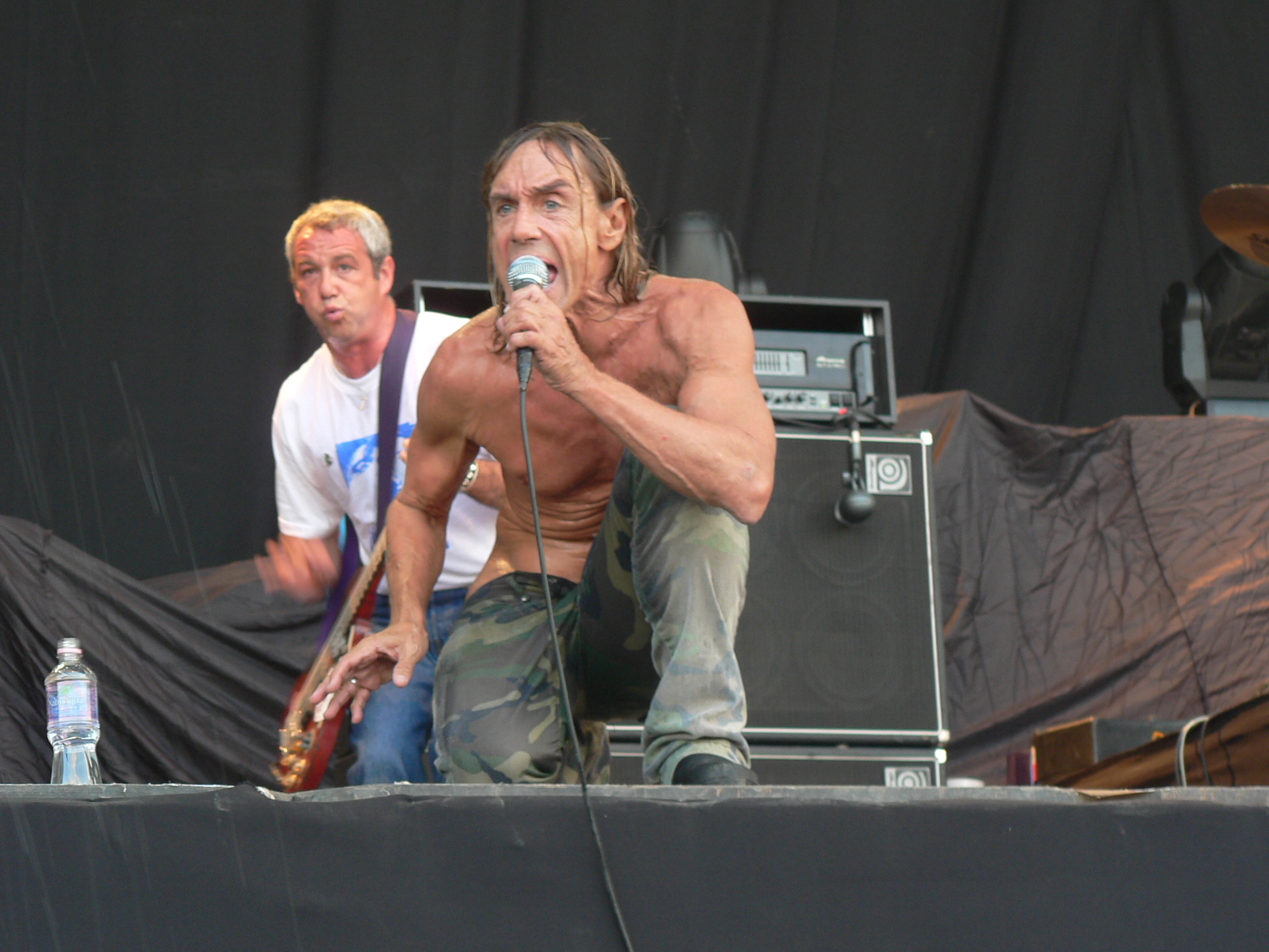 IGGY POP. Budapest, Sziget Festival 2006 08 15